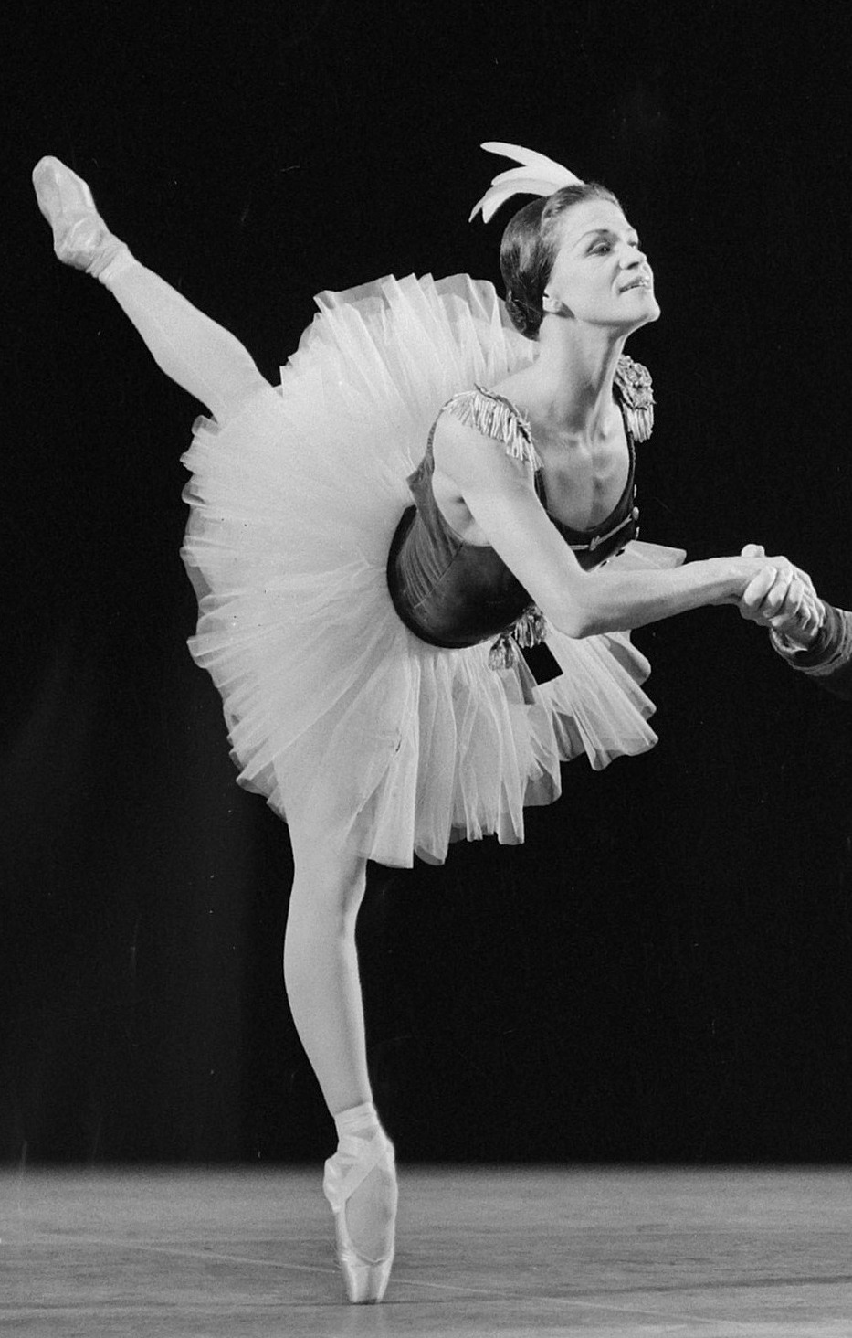 New York City Ballet in Amsterdam, Melissa Hayden